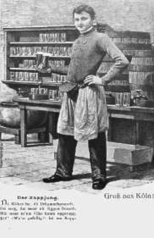 Der Zappjung